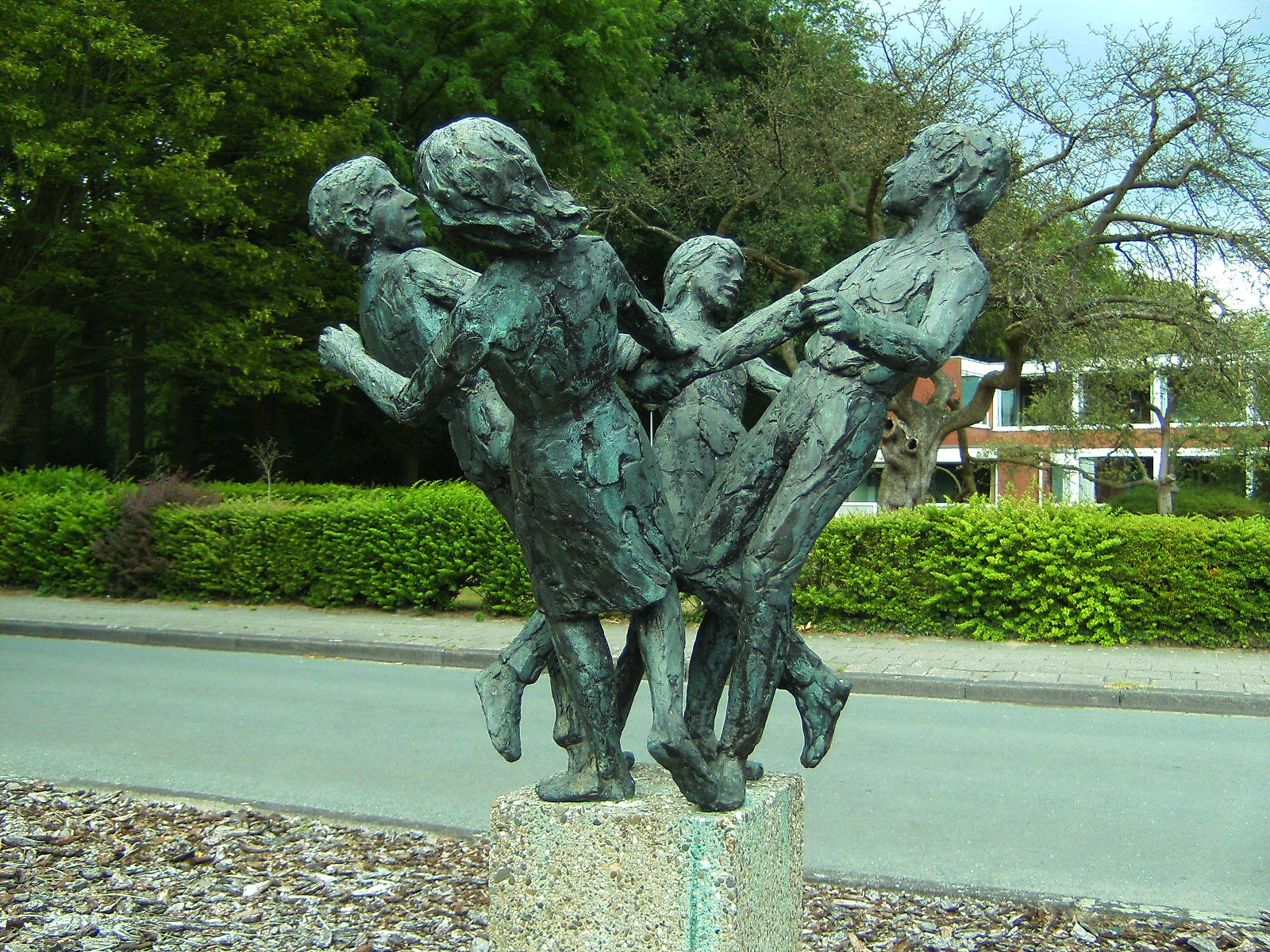 Vier dansende jonge mensen in brons van Antoinette Ruiter. In 1979 geplaatst bij gemeenschapshuis het Haarhuis in Schalkhaar. Later verplaatst naar zalencentrum de Lindeboom aan de Lindeboomsweg te Schalkhaar